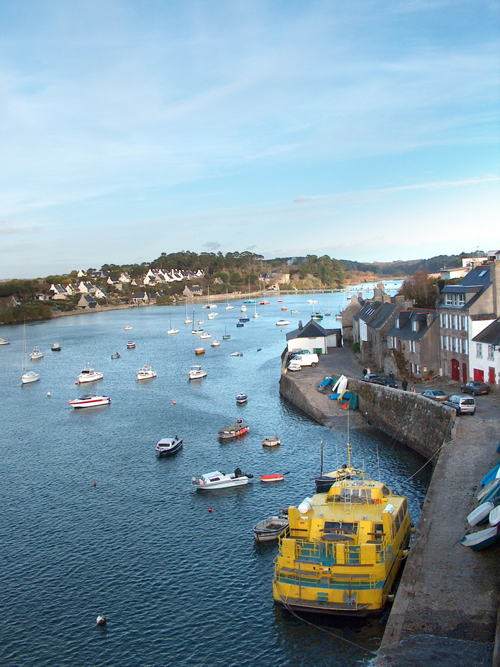 Sujet : Le port du Conquet. Auteur : Valérie. Date de création de l'image : 11 novembre 2004 Licence : Licence GFDL. Auteur : Utilisateur:Valérie75